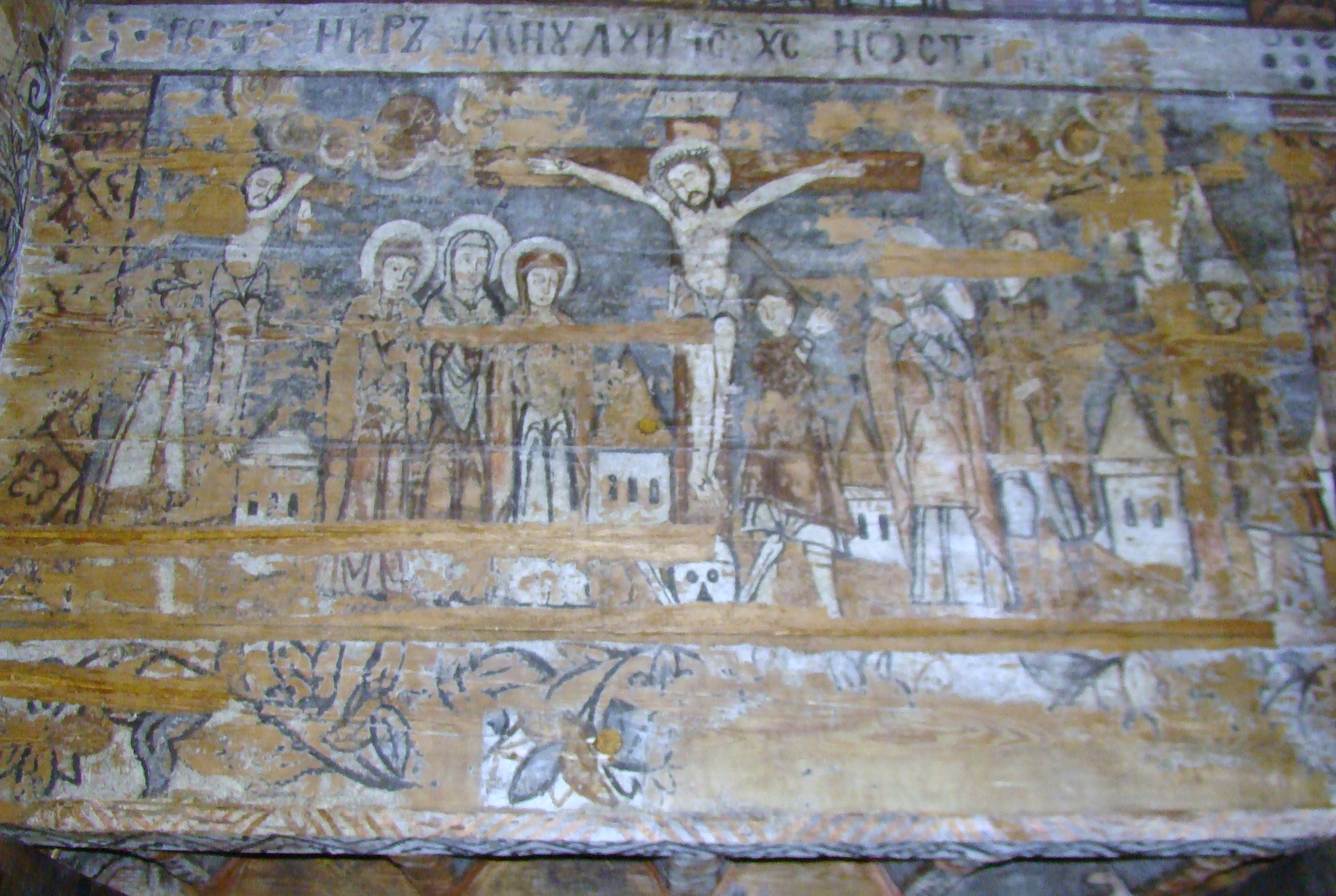 Biserica de lemn "Naşterea Maicii Domnului", sat IEUD